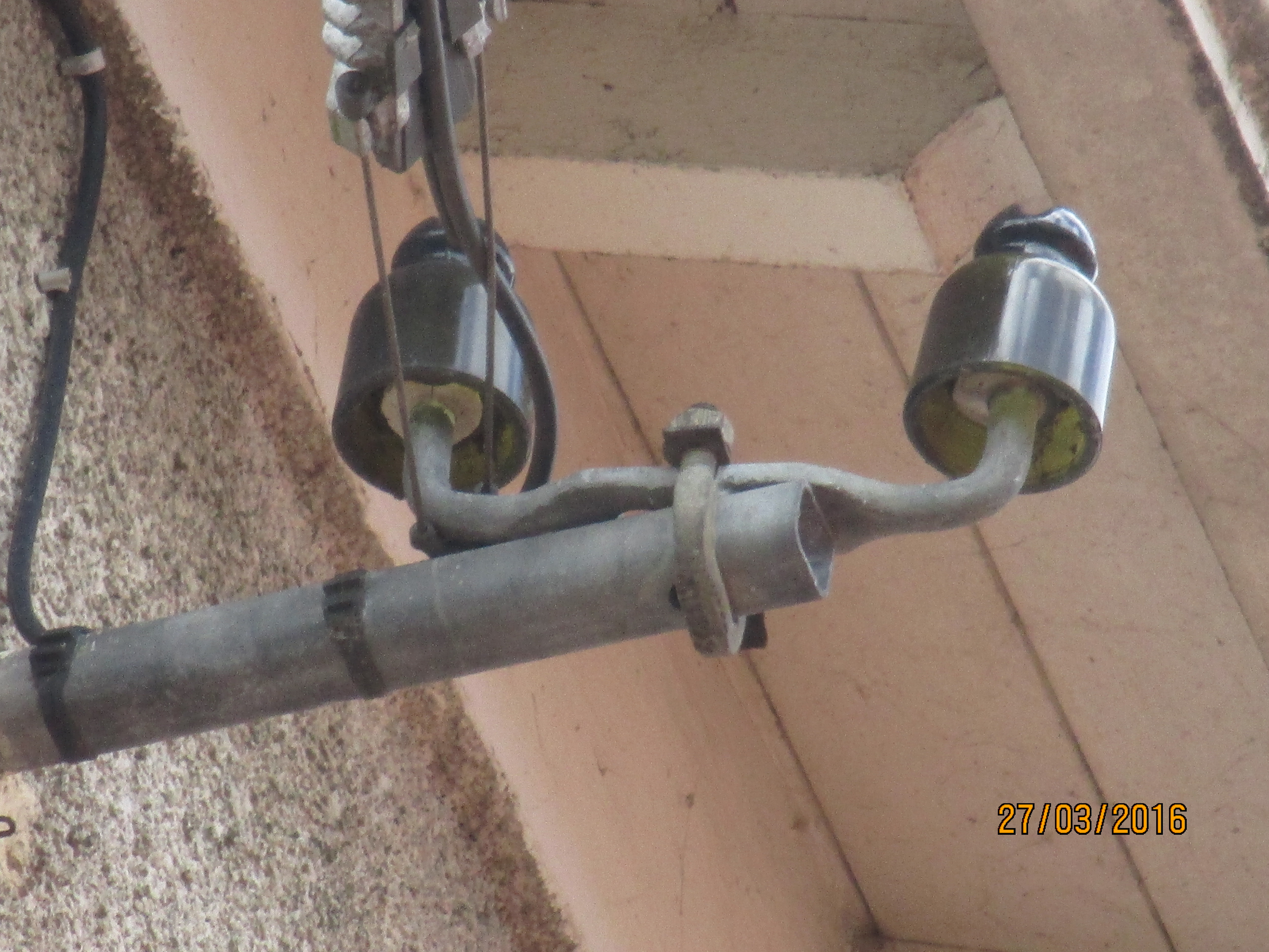 Photographie prise à Nalliers (Vendée) montrant un branchement téléphonique d'une maison, et portant deux isolateurs de fabrication Verrerie d'Albi, de couleur foncée appelée "vert bouteille".